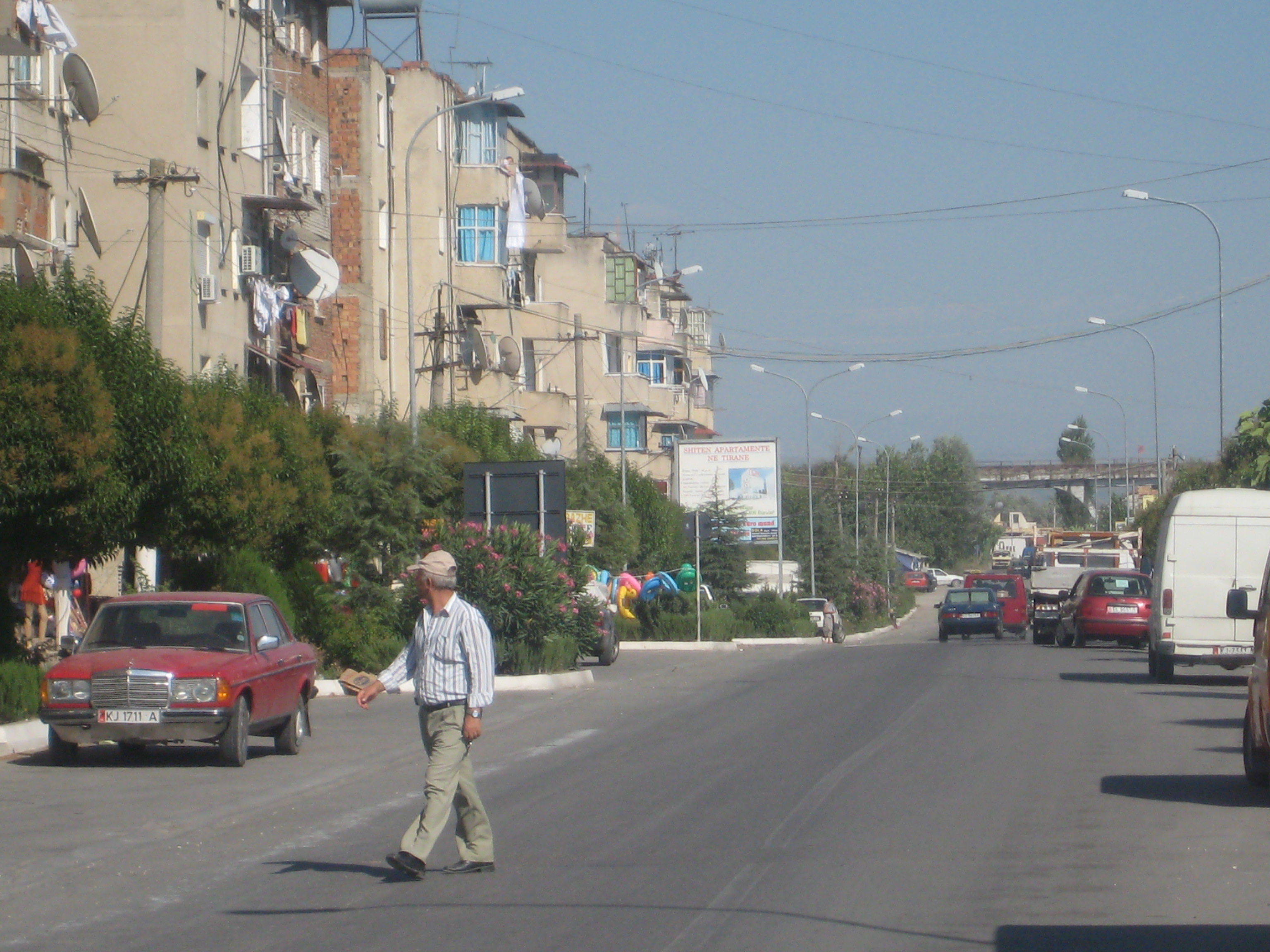 Rrogozhina – Albania